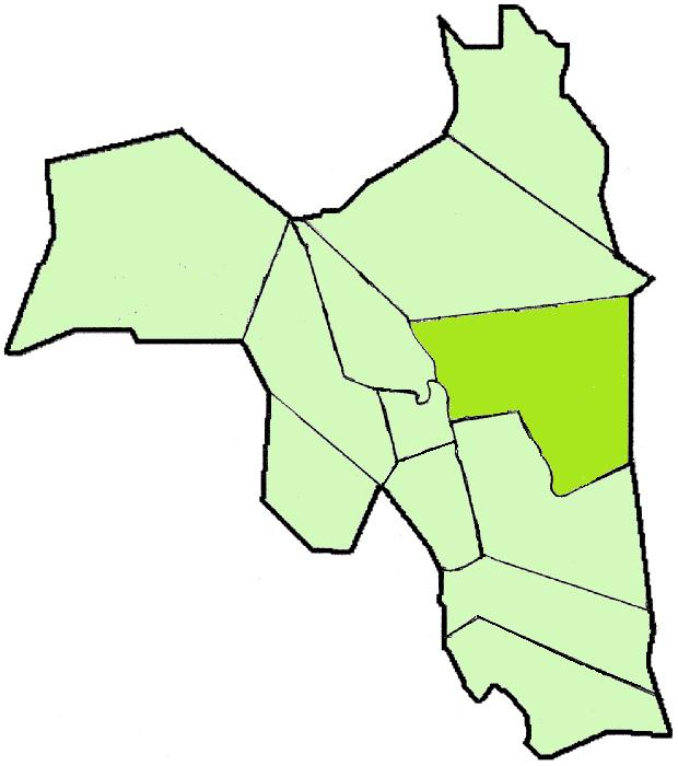 Lapinjärven kartta: Lindkosken sijainti